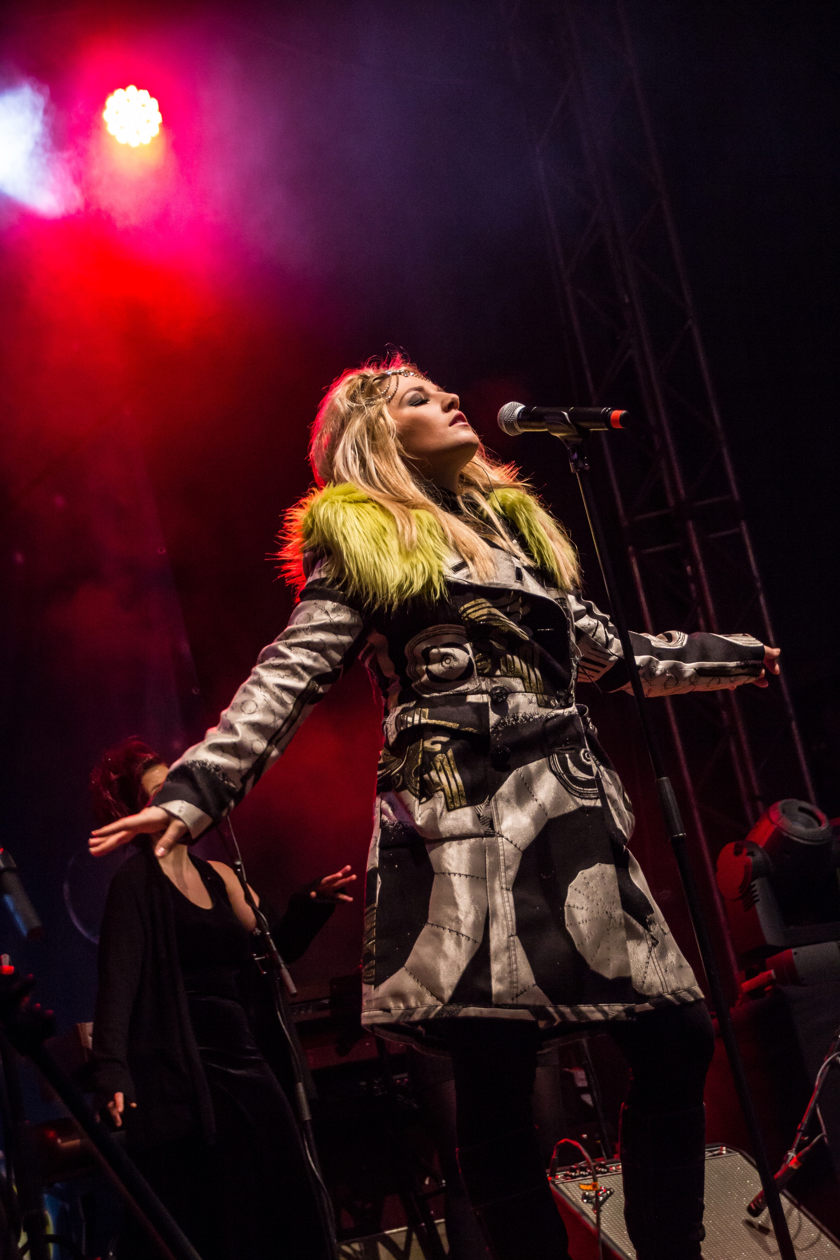 Foto: Chris Novak Mel Verez live bei ihrem Konzert am Silvesterpfad 2013